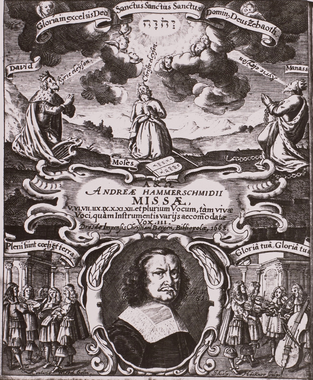 Hammerschmidt, Andreas: Missa für 12 und mehr Stimmen. 1663. Titelkupfer von Johann Caspar Höckner nach Conturio Wiebol mit Bildnis des Komponisten